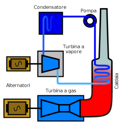 Schema di un impianto a gas con cogenerazione tramite turbina a vapore.